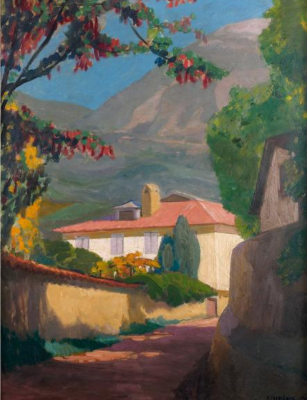 Le chemin a l'ombre